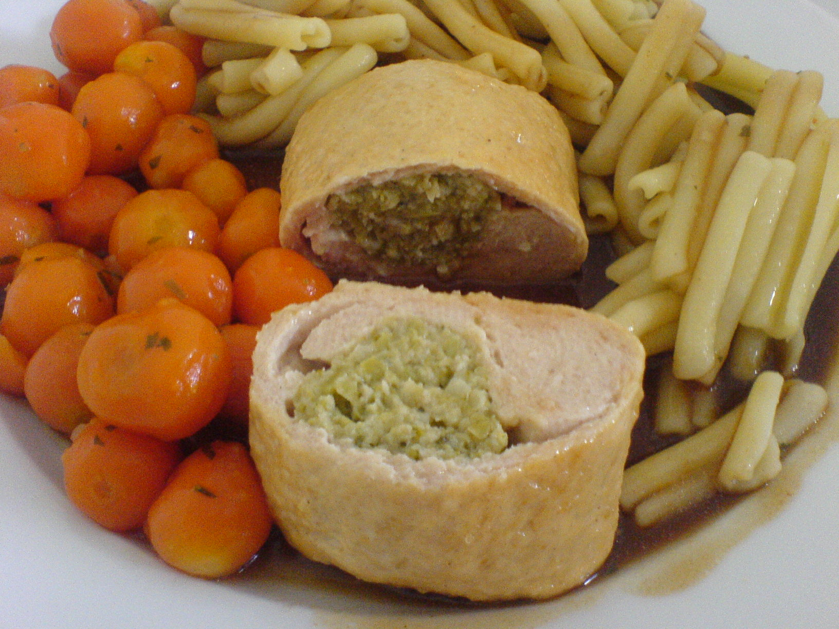 Putenroulade